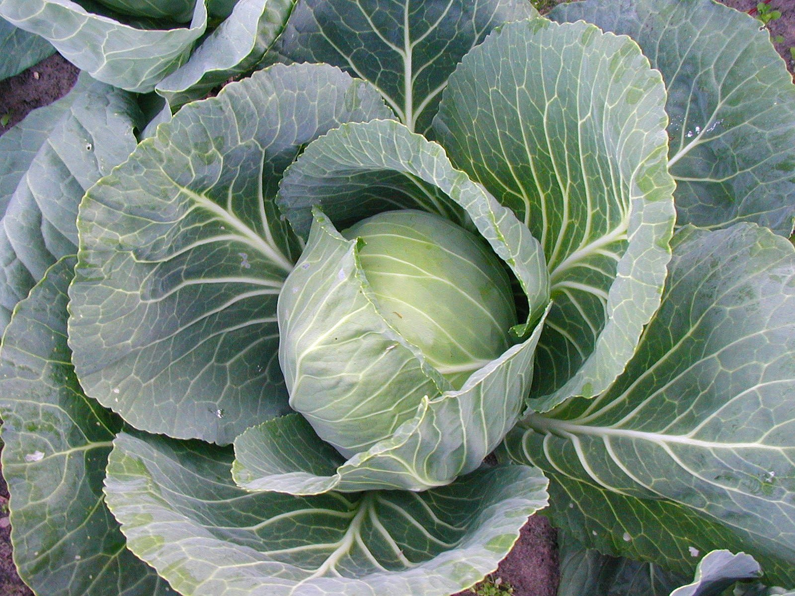 Cabbage